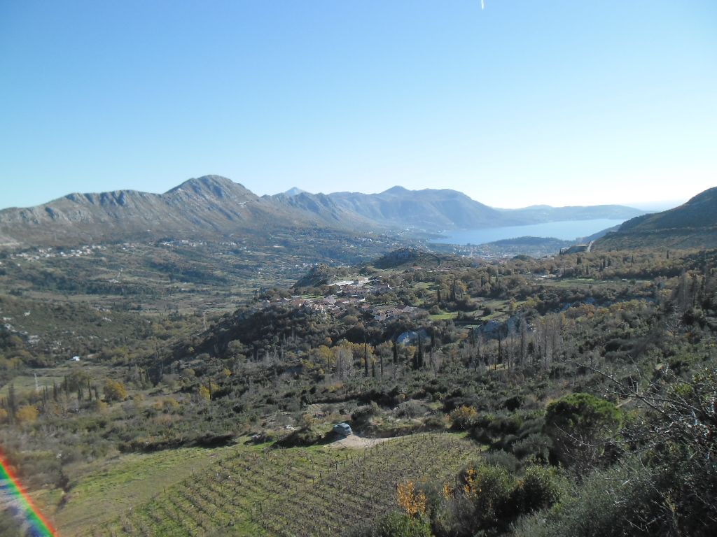 pogled na Župu dubrovačku